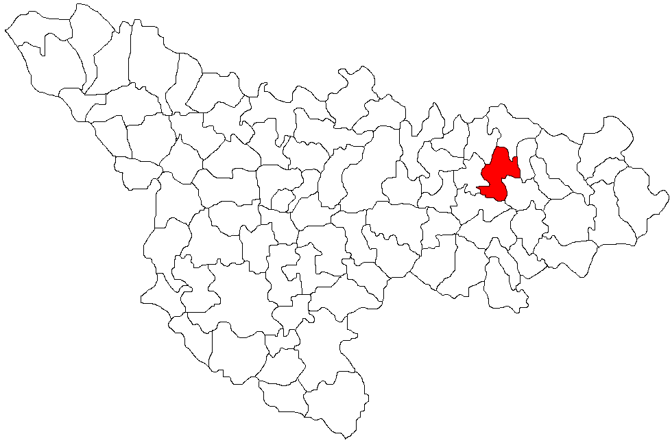 Bethausen, Timis Licensing Categorie:Hărţi ale judeţului Timiş